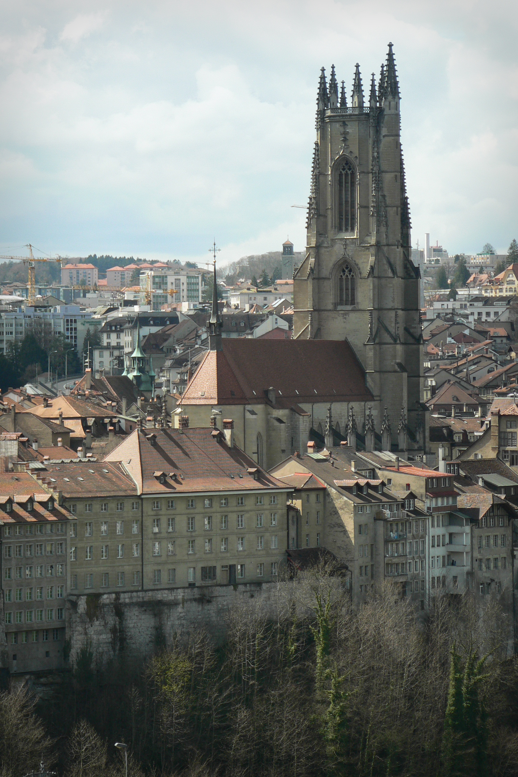 Cathédrale Saint-Nicolas de Fribourg